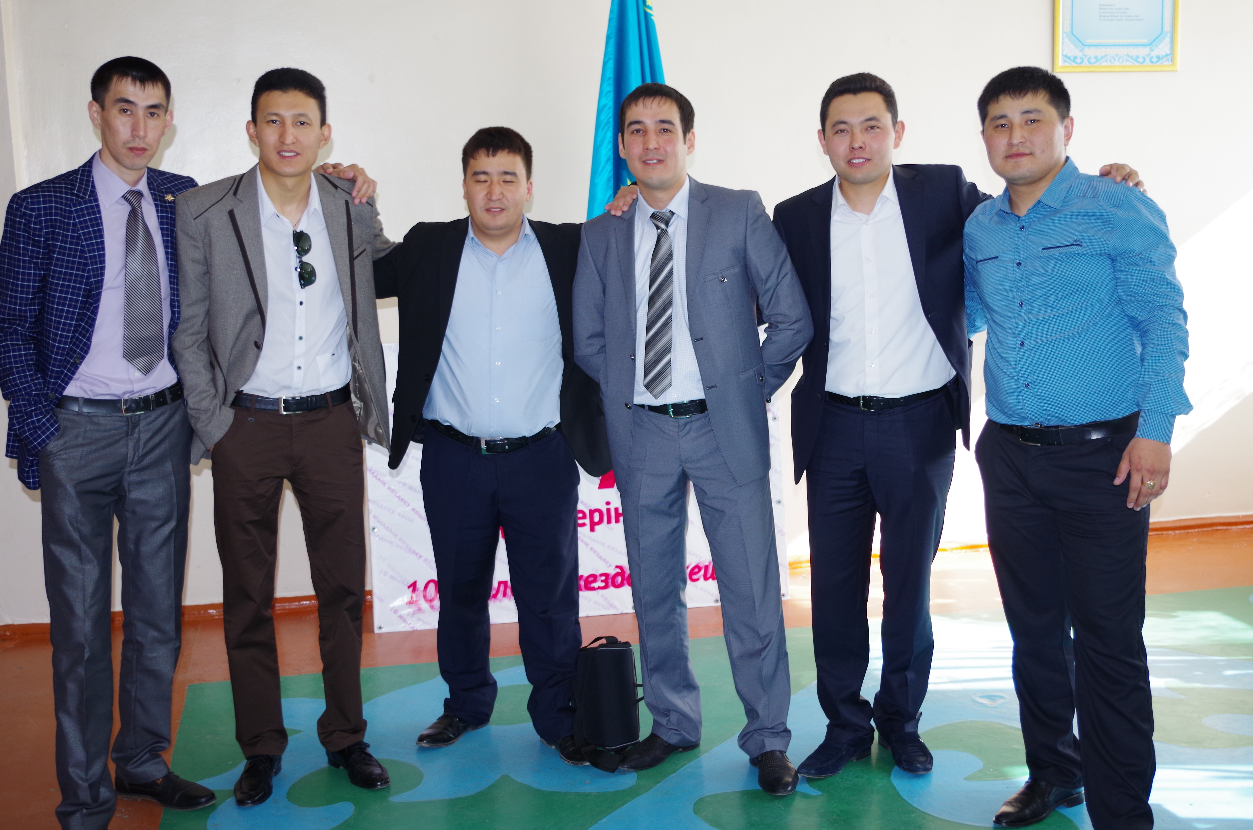 Молодежь Агадырь